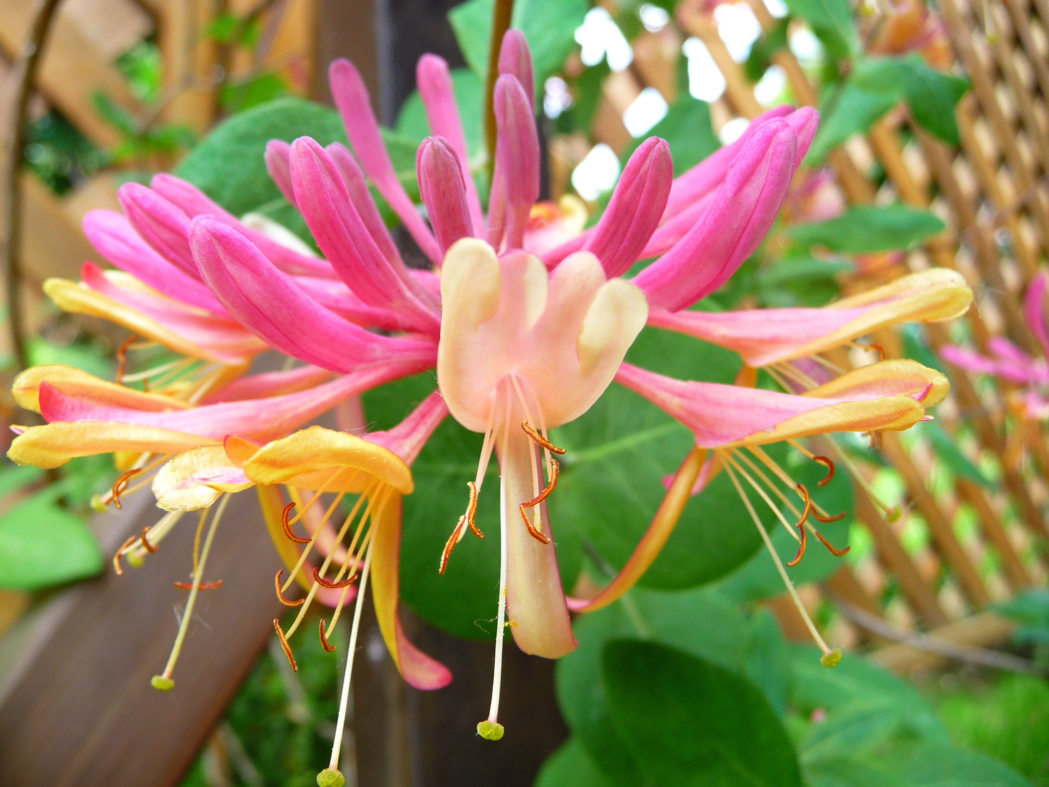 Blüte des Gartengeißblatts (Lonicera caprifolium)